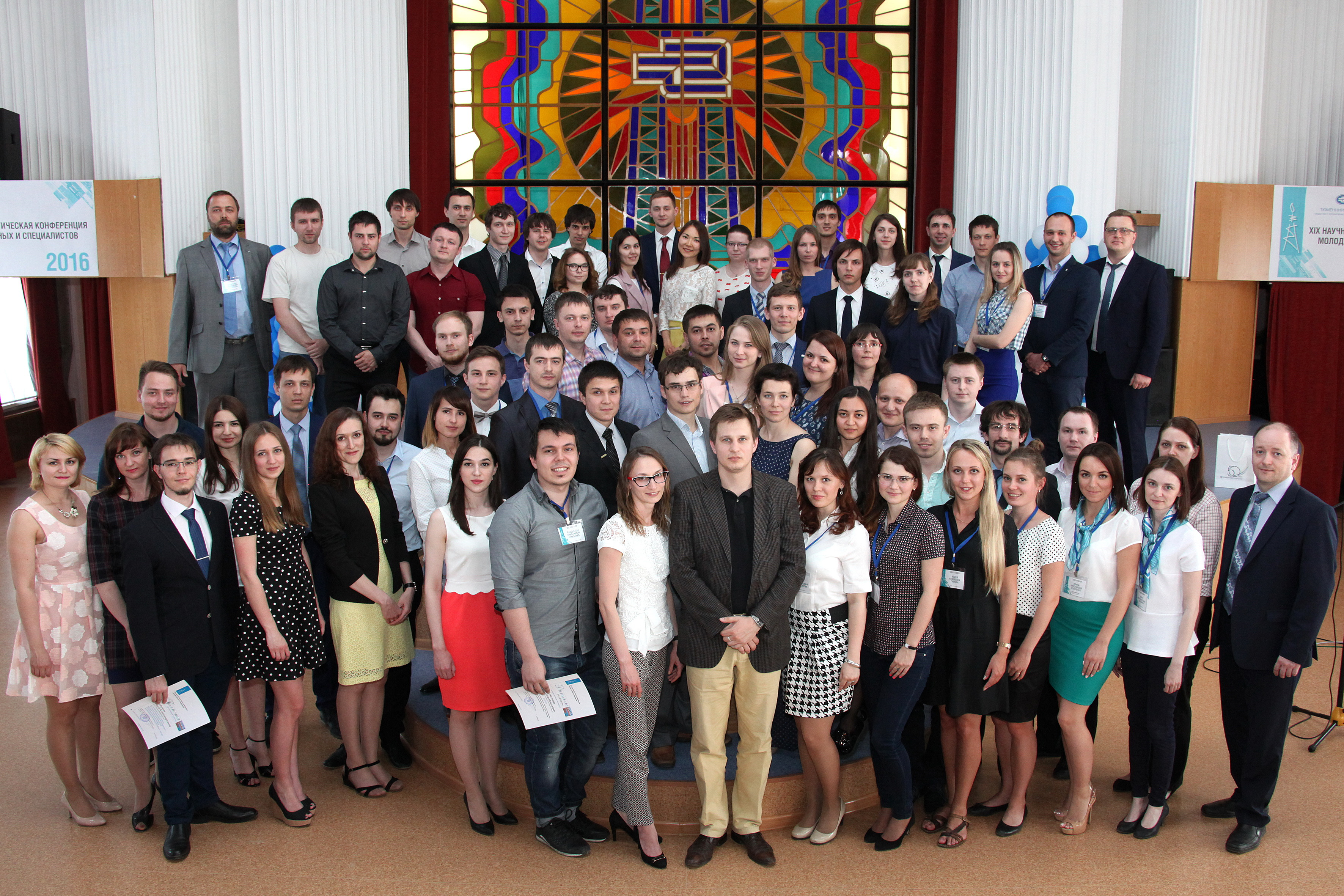 Участники XIX конференции молодых ученых и специалистов «Проблемы развития газовой промышленности Западной Сибири». г. Тюмень.